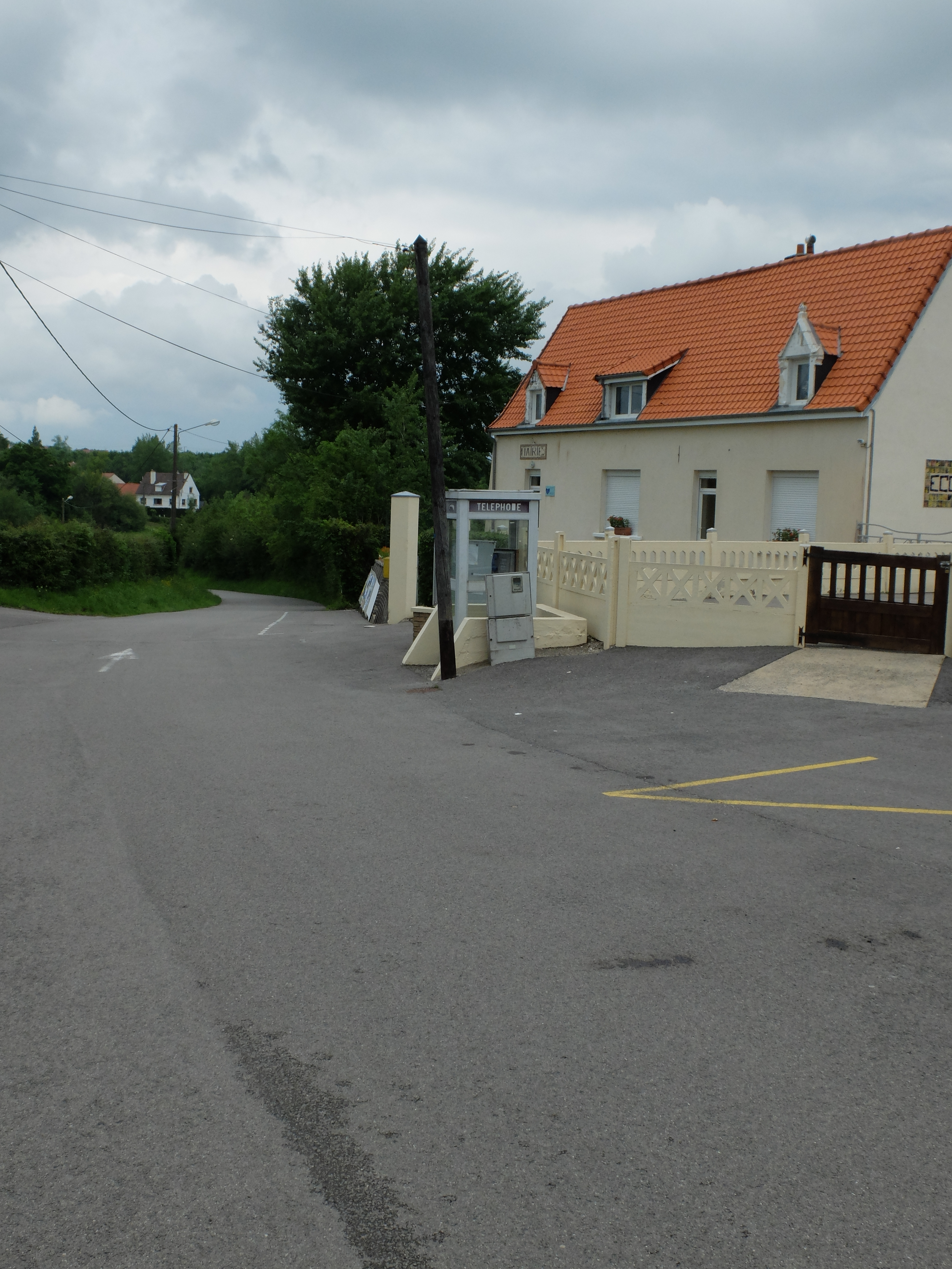 Vue de la rue de l'école de Menneville (Pas-de-Calais), avec notamment la mairie-école.